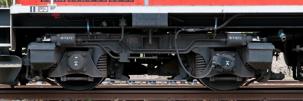 JR東日本DD1611のDT113H形台車。